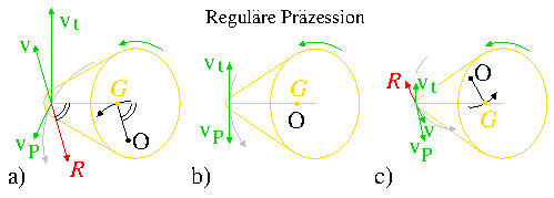 Die Geschwindigkeit v des untersten Kreiselpunkts ergibt sich aus seiner Umfangsgeschw. v_t und der Präzession v_P. Die Reibkraft R ist der resultierenden Geschwindigkeit v entgegen gerichtet.